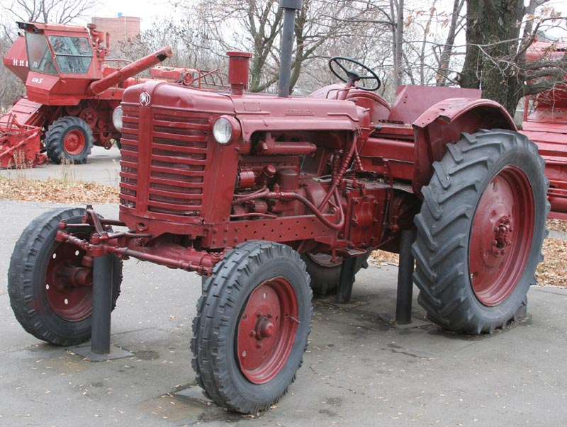 Трактор МТЗ-5 в Саратове на Соколовой горе